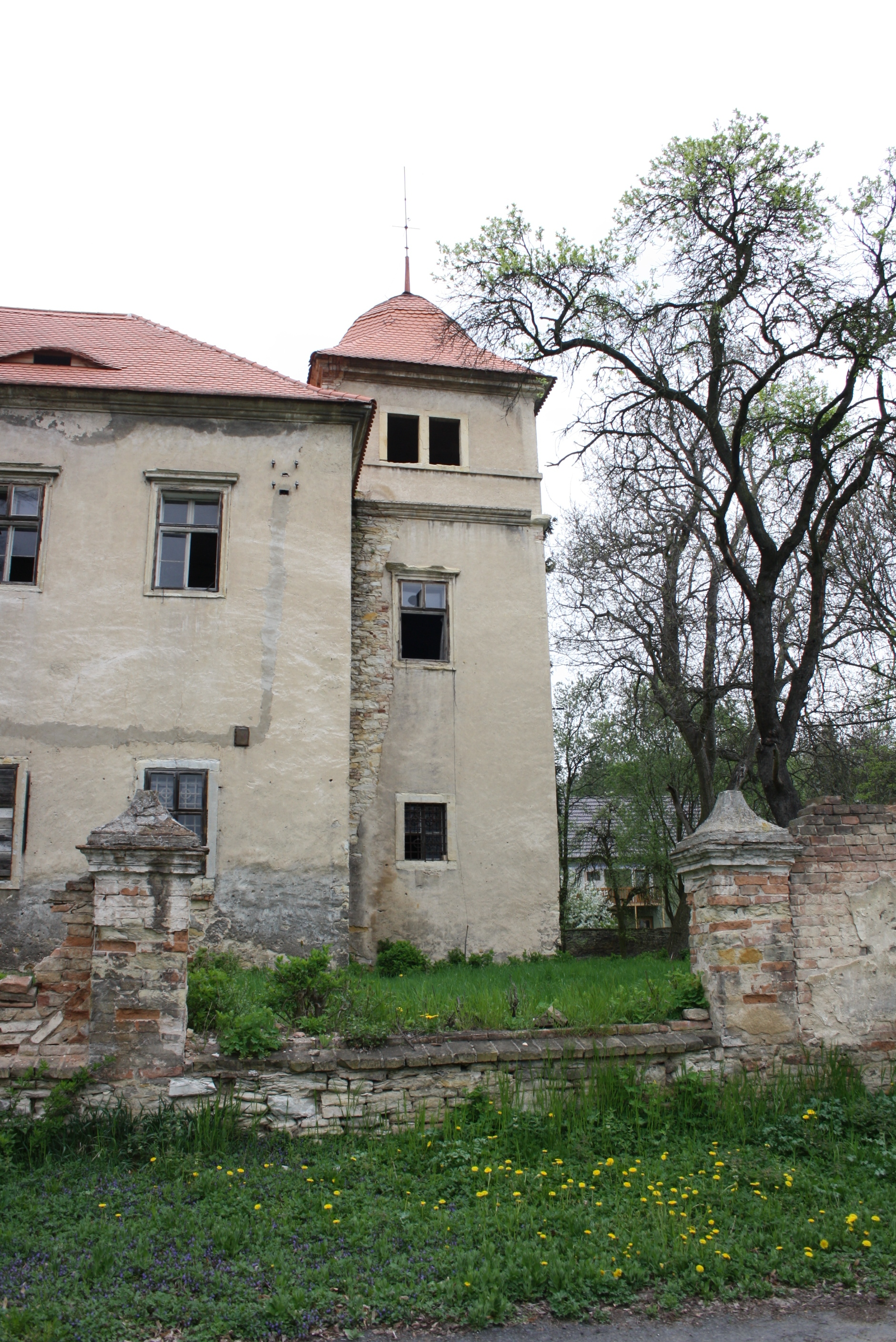 Věž encovanského zámku (pohled od jihu).